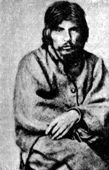 Ишутин Николай Андреевич - один из первых русских профессиональных революционеров, руководитель революционной организации.